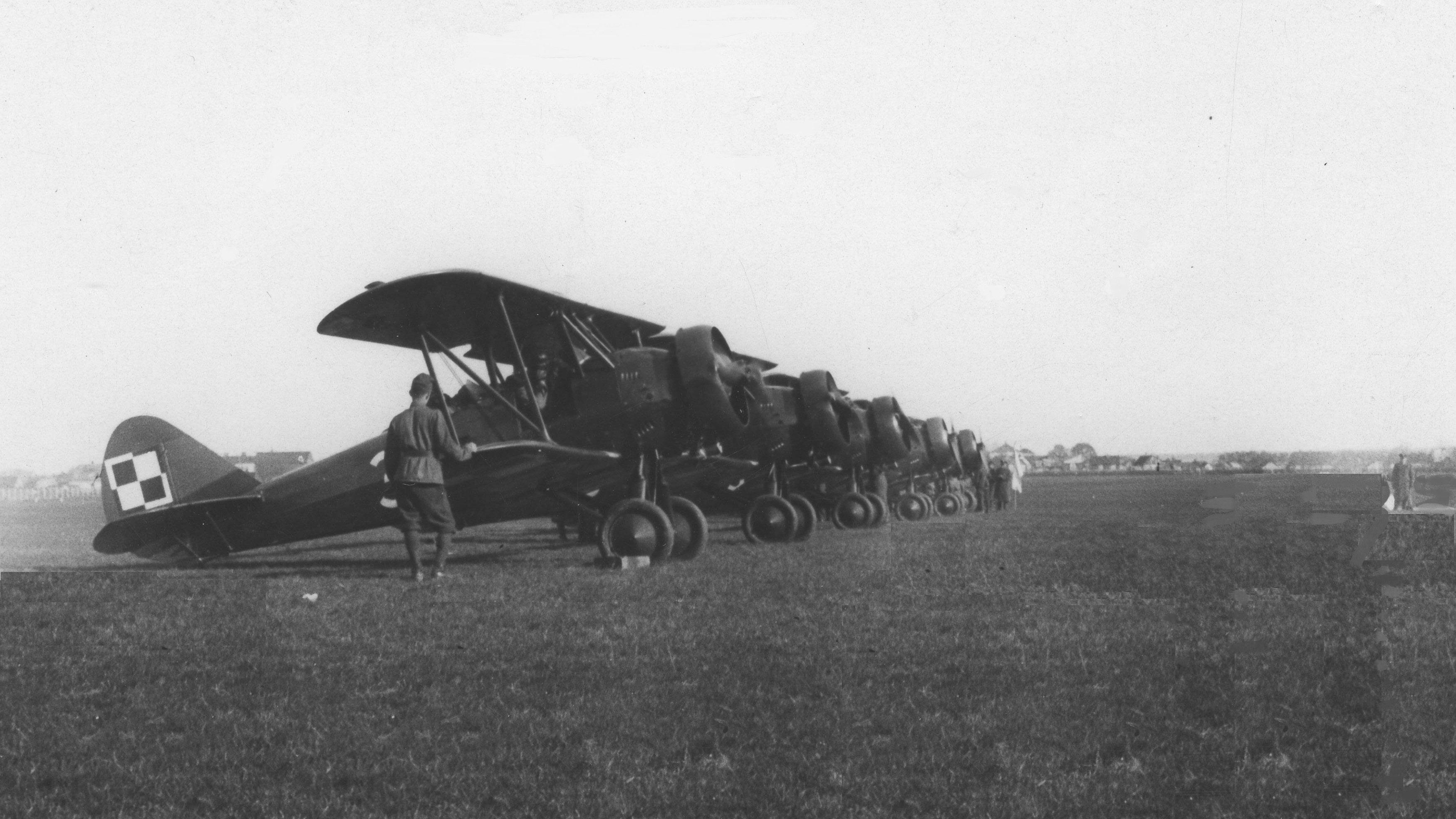 Samoloty PWS-26 w CWOL. Komendant Centrum Wyszkolenia Oficerów Lotnictwa w Dęblinie ppłk obs. Stefan Sznuk (w oddali) wypuszcza do lotu pierwsze samoloty typu PWS 26.